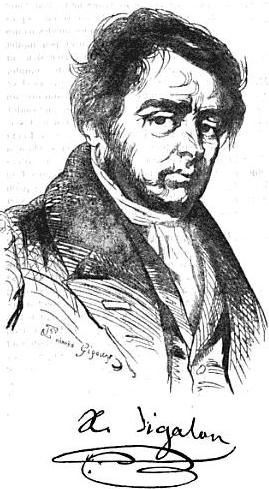 Xavier Sigalon